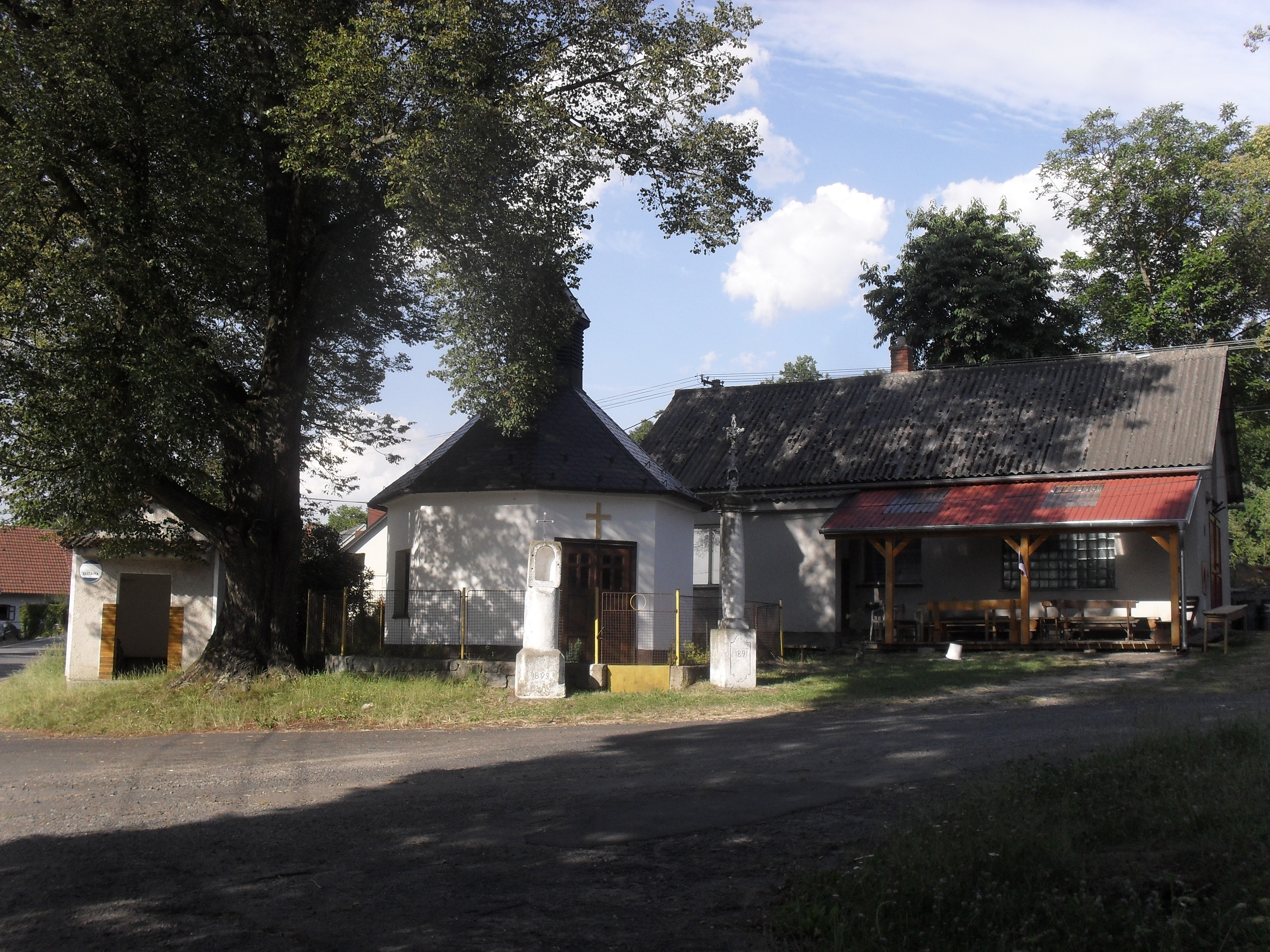 Fotografie pořízena v Klatovské obci Strážovice u Pačejova.